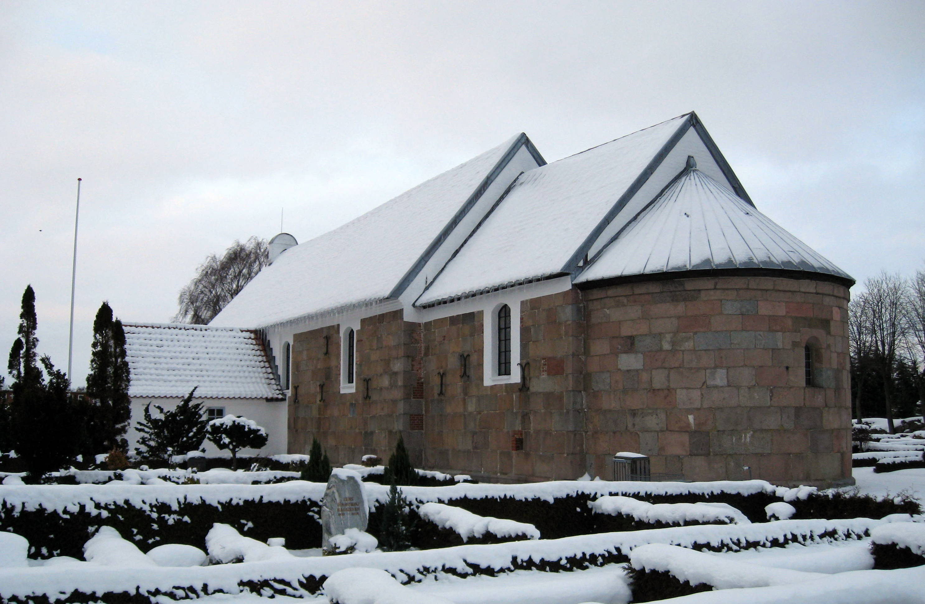 Brønderslev Gamle Kirke